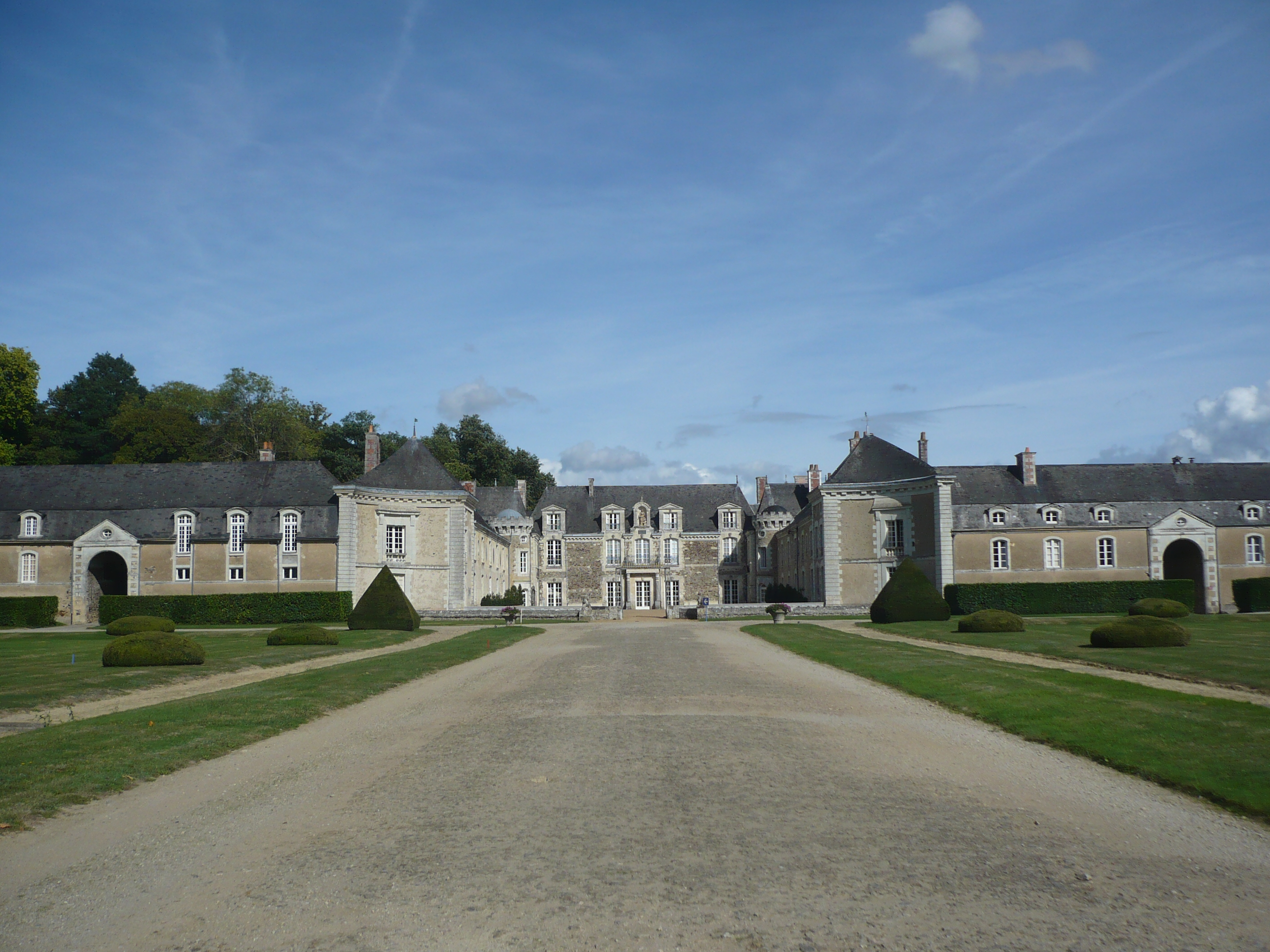 La Chapelle-sur-Oudon - Château de la Lorie. Vue de face.